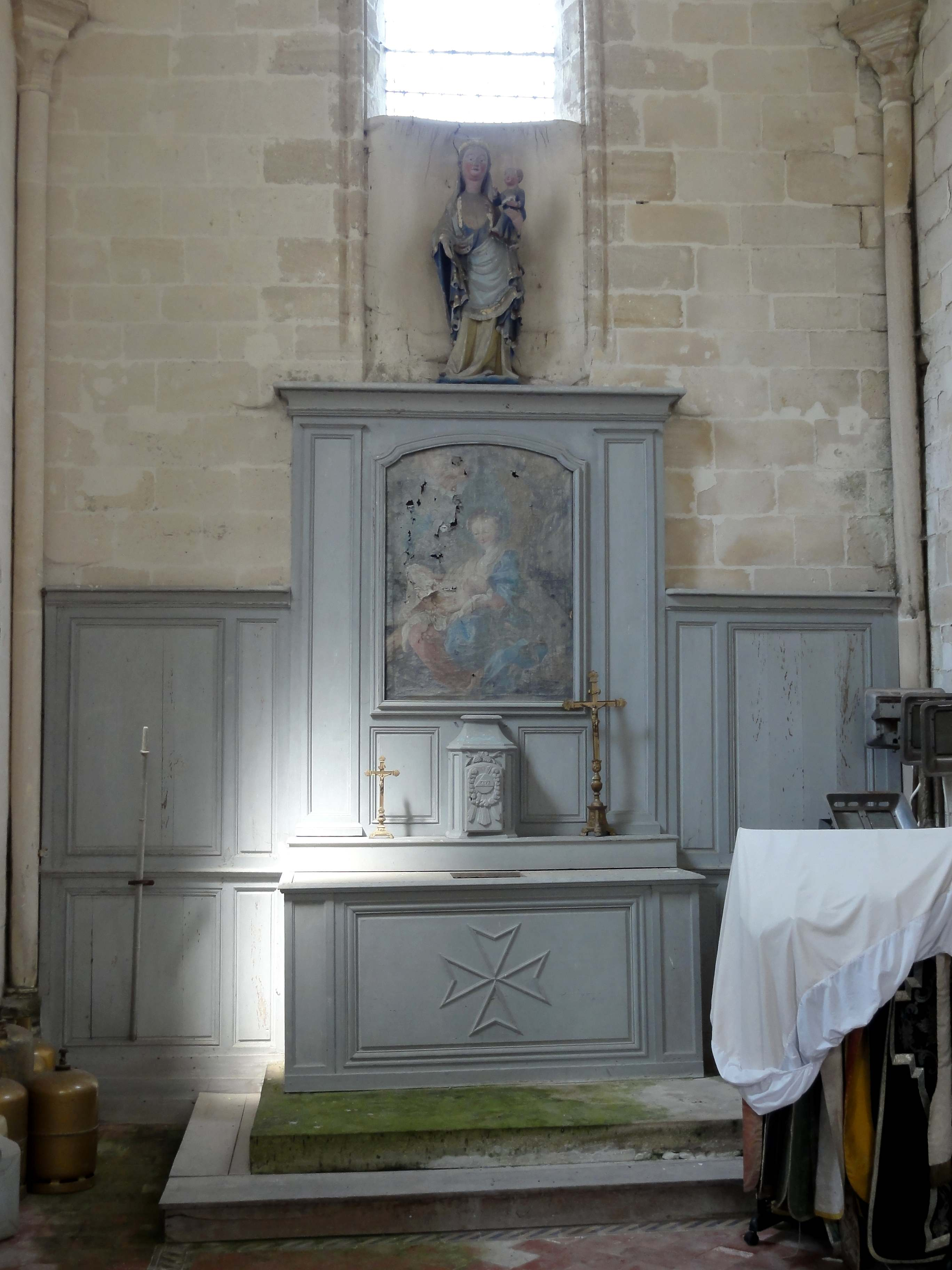 Mobilier de l'église (voir titre).